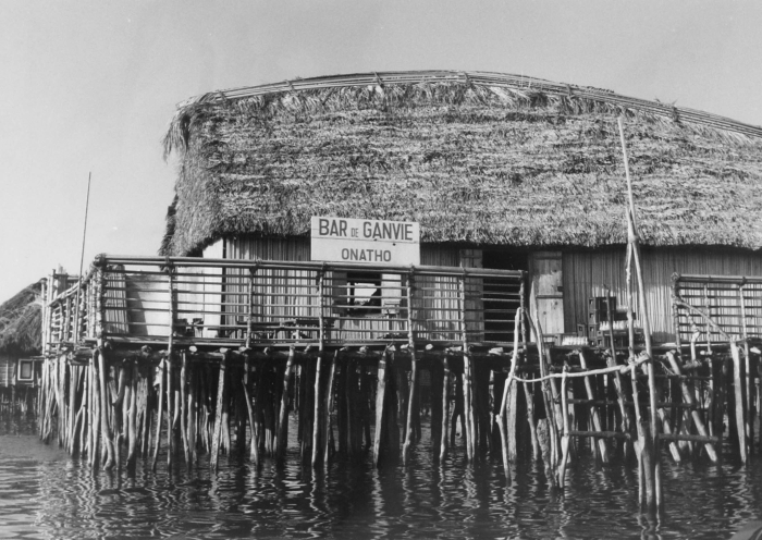 Ganvié is midden in een zoutwatermeer gebouwd en ligt aan de zuidkust van Benin. Het paalwoningendorp werd gebouwd als reactie op de aanvallen van Fon krijgers op naburige gemeenschappen in de 16e eeuw. De Dan-Homey koning probeerde via de slavenhandel zijn rijkdom te vergroten en liet zijn krijgers het achterland uitkammen op zoek naar slaven. Water vormde echter een serieus obstakel voor de krijgers, zij waren gebonden aan traditionele wetten waarin het betreden van water 'taboe' was. Vluchtelingen besloten daarop hen voortaan uit de weg te gaan door een dorp midden in de lagune te bouwen, en met succes. Zo ontstond het volk van de Tofinu, 'mensen gedragen door het water'. De bescherming van het water heeft er toe bijgedragen dat de bevolking tegenwoordig enkele tienduizenden zielen telt. In het dorp wordt alles via het water gedaan. Er zijn nauwelijks bruggen en kleine bootjes ('pirogues') varen af en aan tussen de huizen.